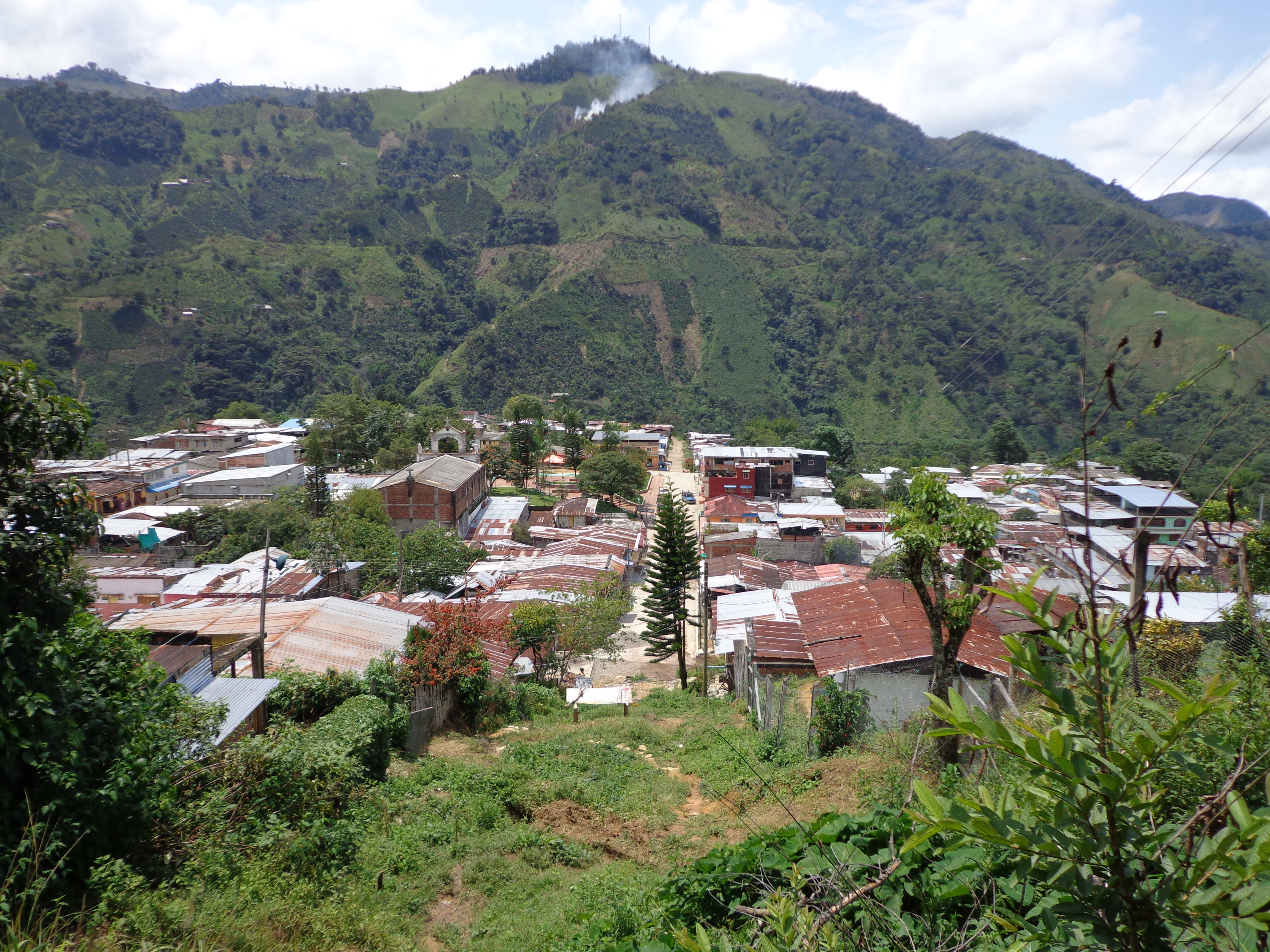 Panorámica de Gaitania